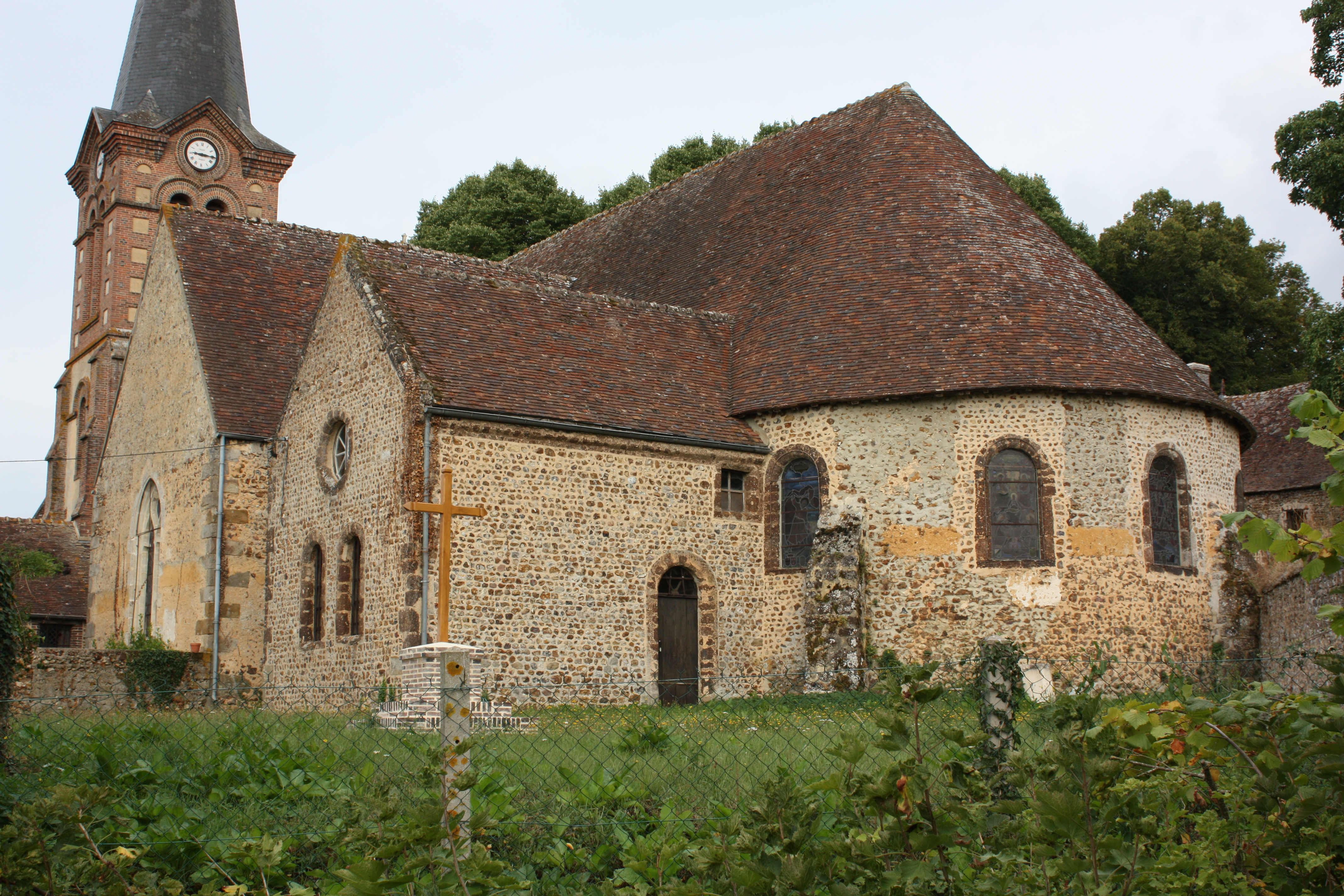 Vue générale Sud-Est église Notre-Dame de Chennebrun